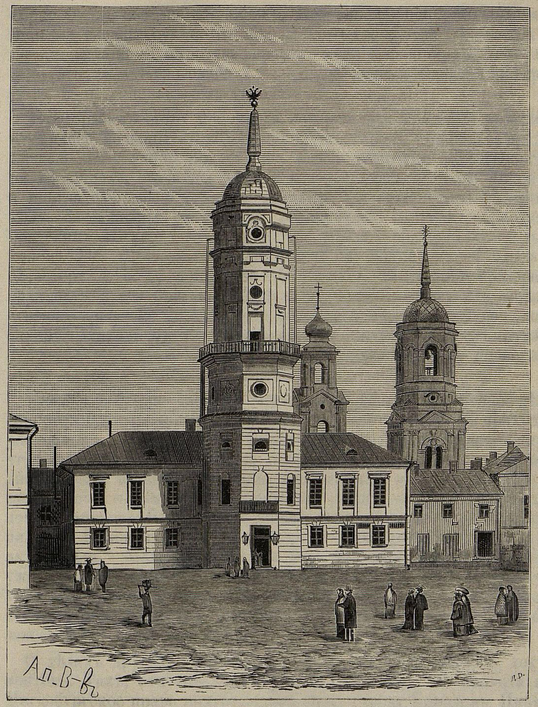 Беларуская (тарашкевіца): Магілёў (Mahiloŭ), пляц Рынак (plac Rynak). Ратуша